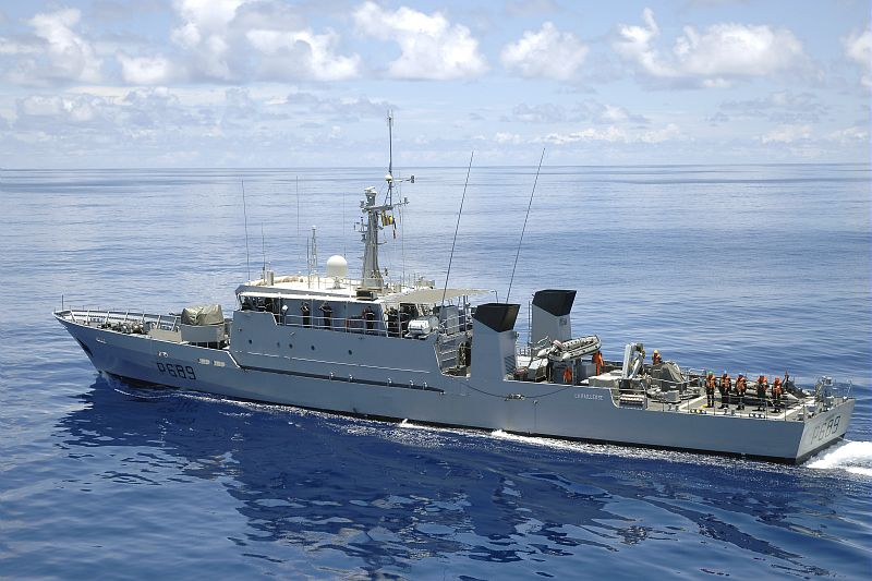 Patrouilleur type P400 La Railleuse dans les eaux Polynésienne Française